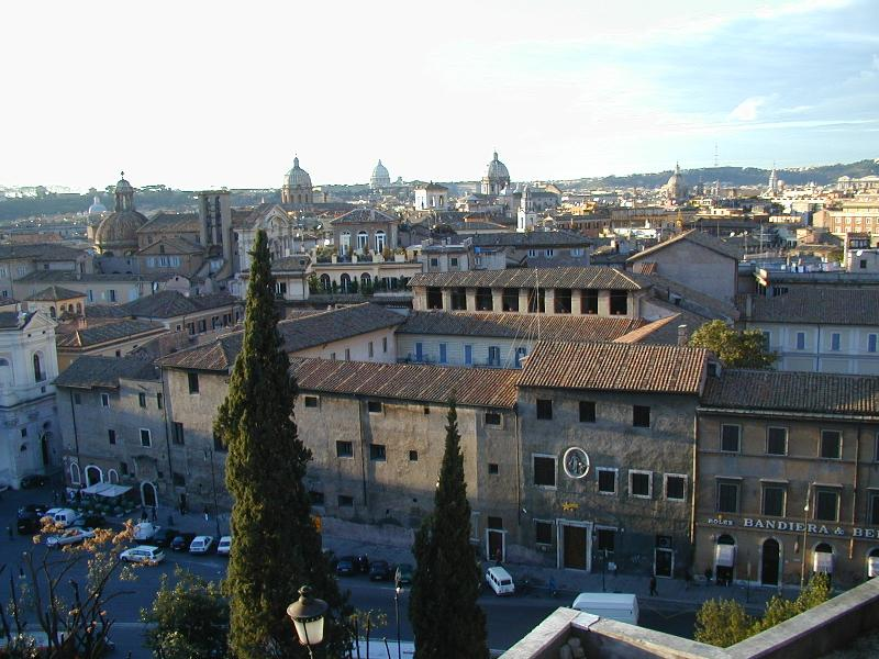 Roma, panoramica del Convento delle Oblate di santa Francesca Romana dal Campidoglio